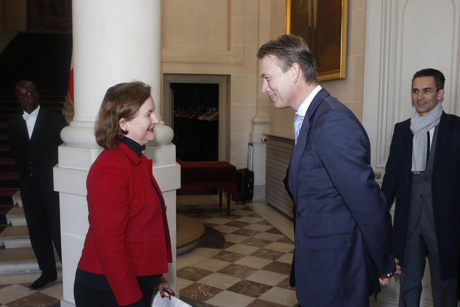 Nathalie Loiseau (Ministre chargée des Affaires européennes) et Halbe Zijlstra (Ministre néerlandais des Affaires étrangères) en 2017